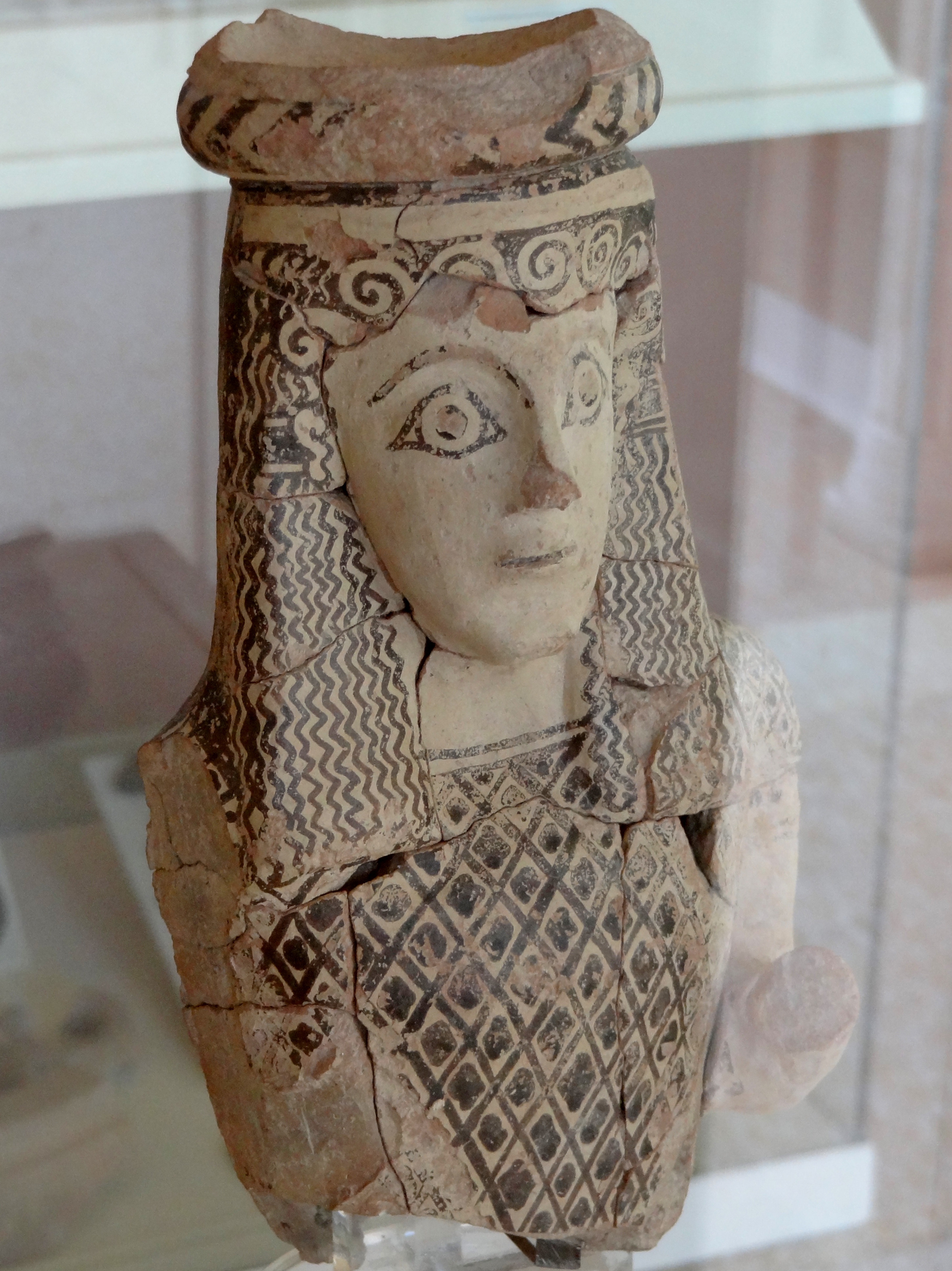 Kleine weibliche Terrakottafigur (archaische oder geometrische Zeit), aus dem Tempel des Apollon und der Artemis in Despotiko, im Archäologischen Museum von Parikia auf Paros, Kykladen, Griechenland